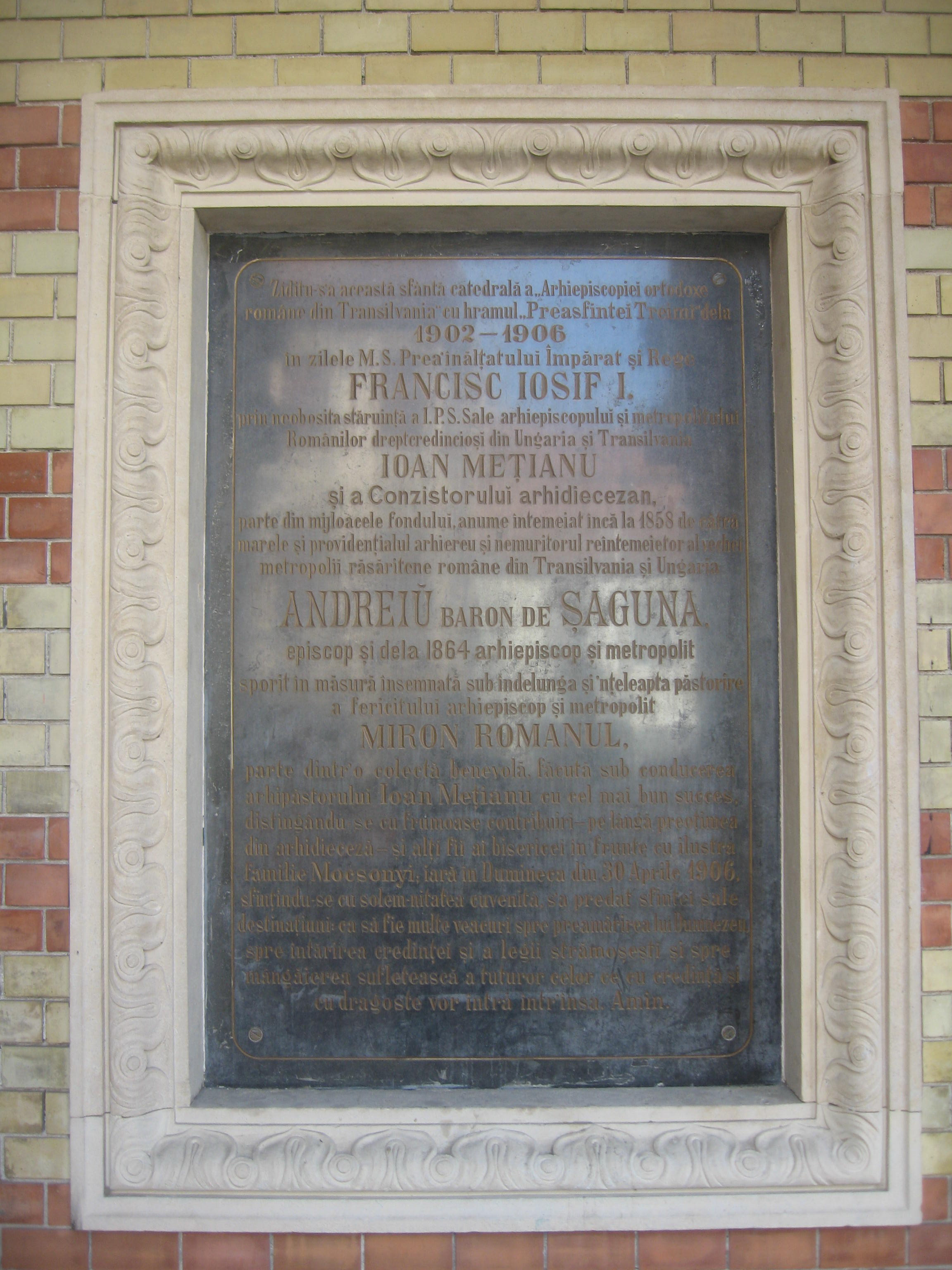 Catedrala mitropolitana din Sibiu